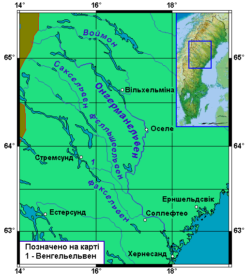 Карта річки Онгерманельвен. Назви річки Онгерманельвен та міст Стремсунд, Хернесанд, Вільхельміна подано за картою Швеції у "Атласі світу" 2008 року видання - Данія, Норвегія, Фінляндія, Швеція. Карта 1:8 000 000. // Атлас світу. - Київ: ДНВП "Картографія". - 2008. С. 64 - 65. Назви інших географічних об'єктів подано за шведськомовними джерелами. Використано карти File:Karta Angermanalven position.gif й File:Sweden relief location map.jpg.